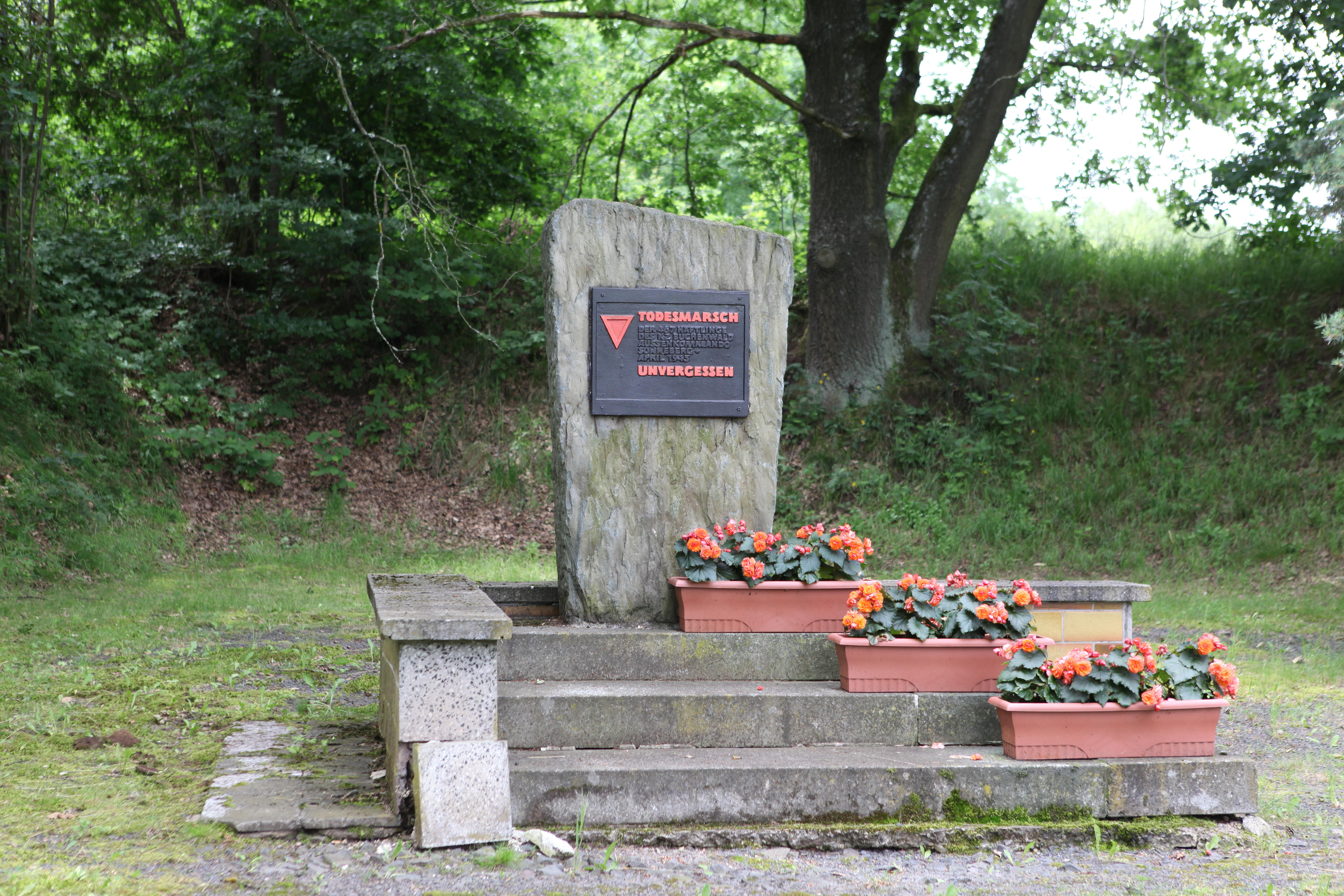 Gedenkstein, Hallstraße in Bettelhecken, OT von Sonneberg, Thüringen